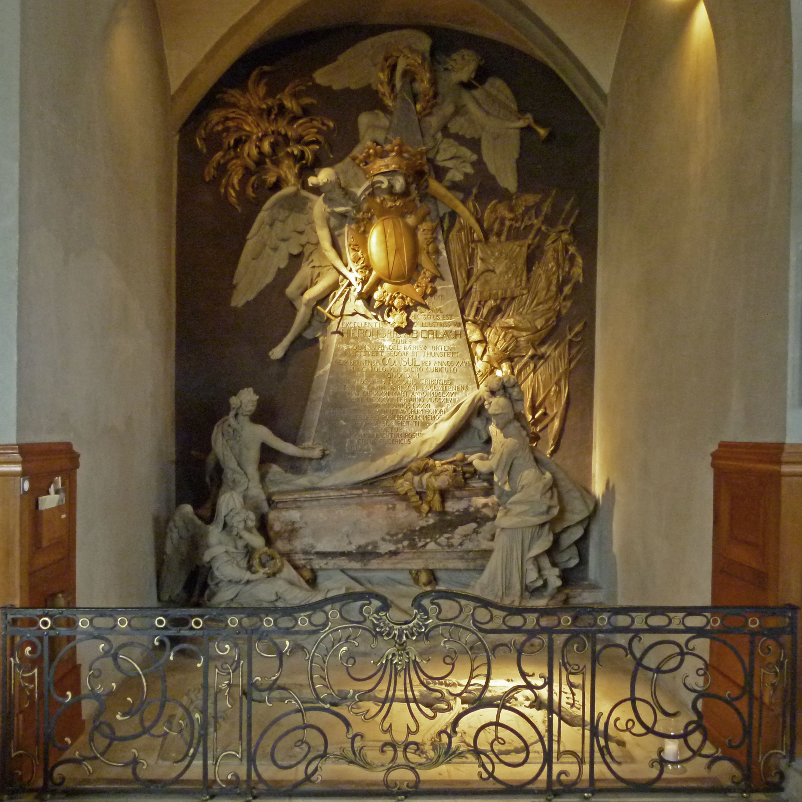 Grabmal des Hironymus von Erlach, Herr auf Schloss Hindelbank, gest.1748, Feldherr und Schultheiss von Bern. Hinter dem Gitter seit 1912 auch das Denkmal für die Pfarrersfrau Maria Magdalena Langhans. Beides Werke des Bildhauers Johann August Nahl